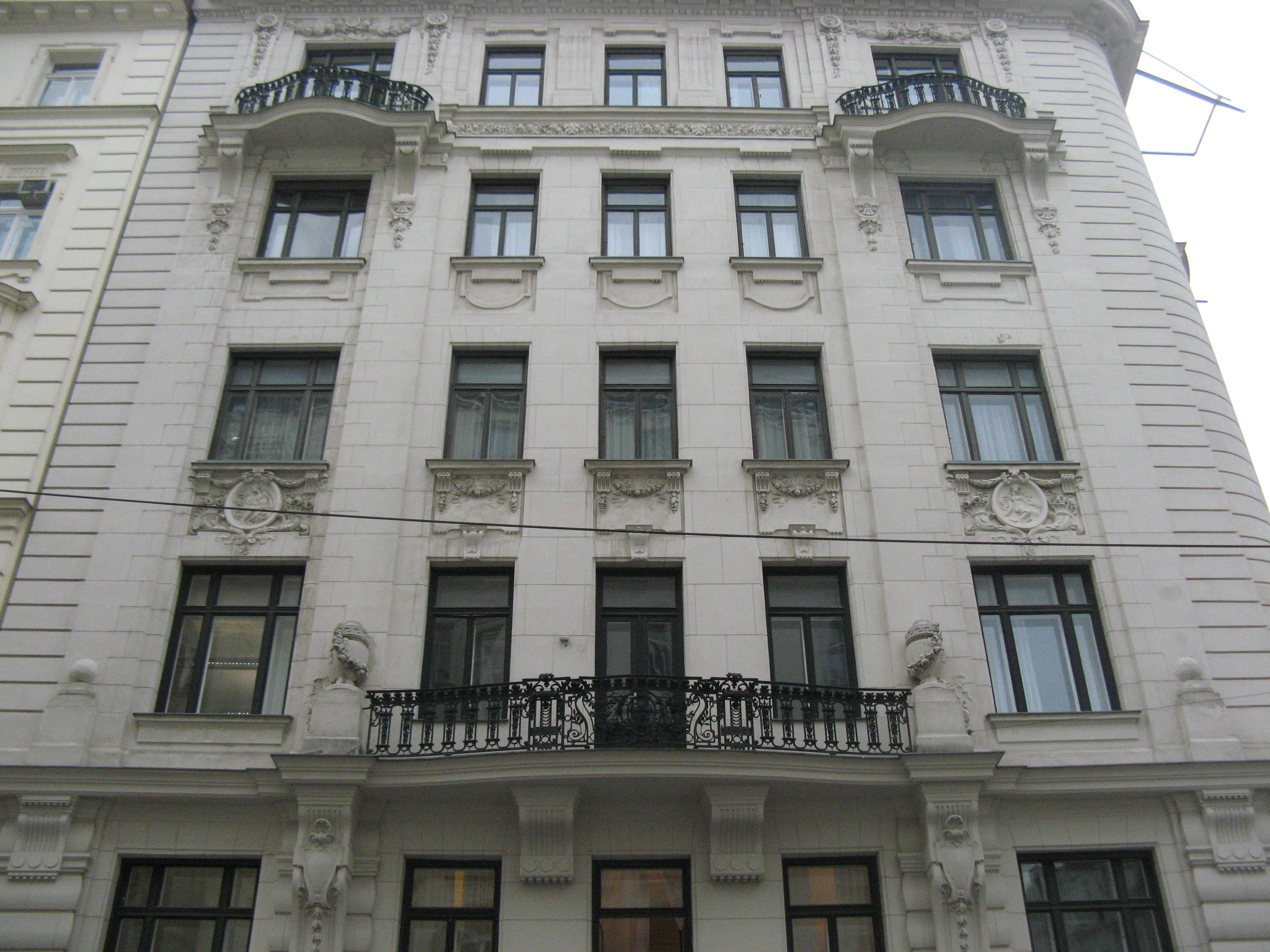 Fassade, Falkestraße 6, Wien-Innere Stadt